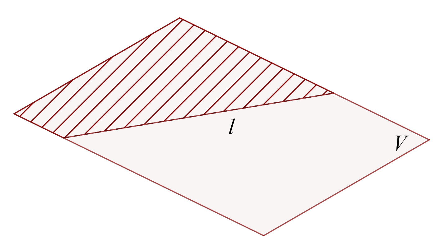 Halfvlakken